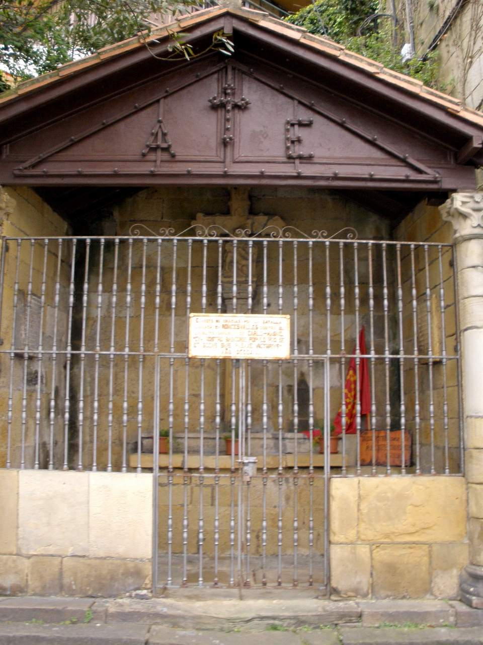 Pasajes de San Juan (Gipuzkoa)